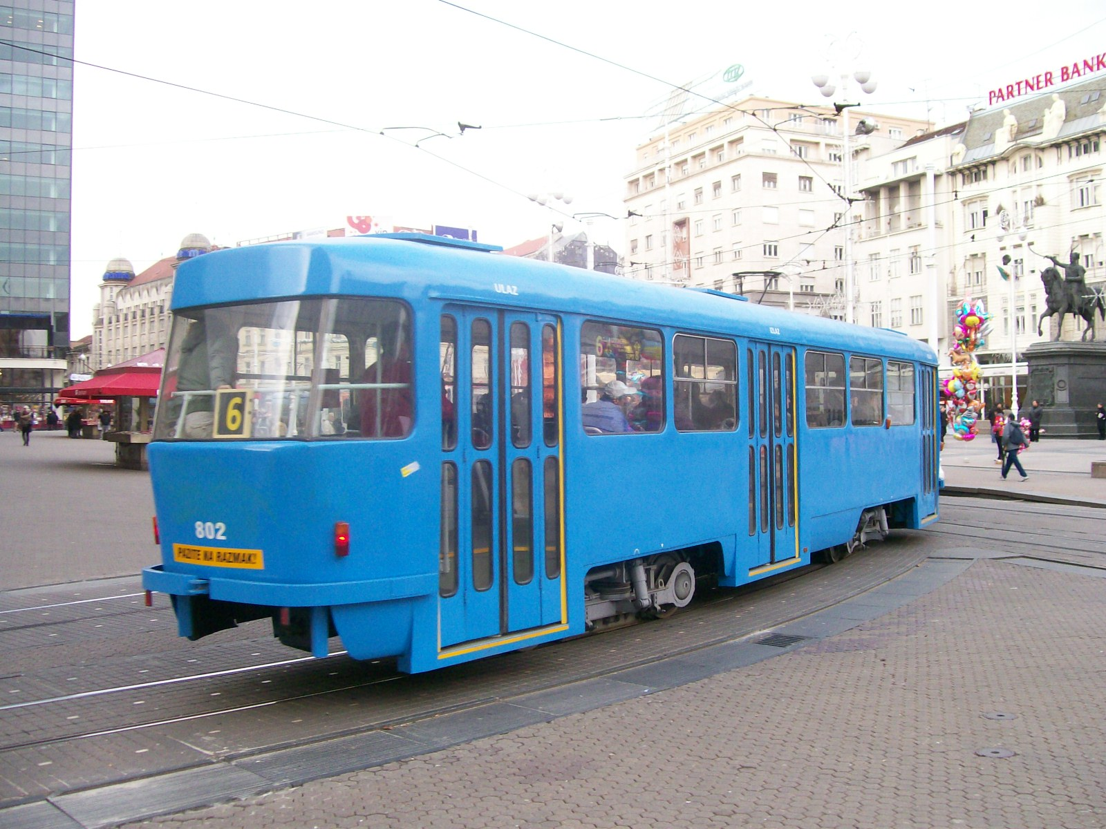 Prikolica TP 801 (ZET Zagreb)